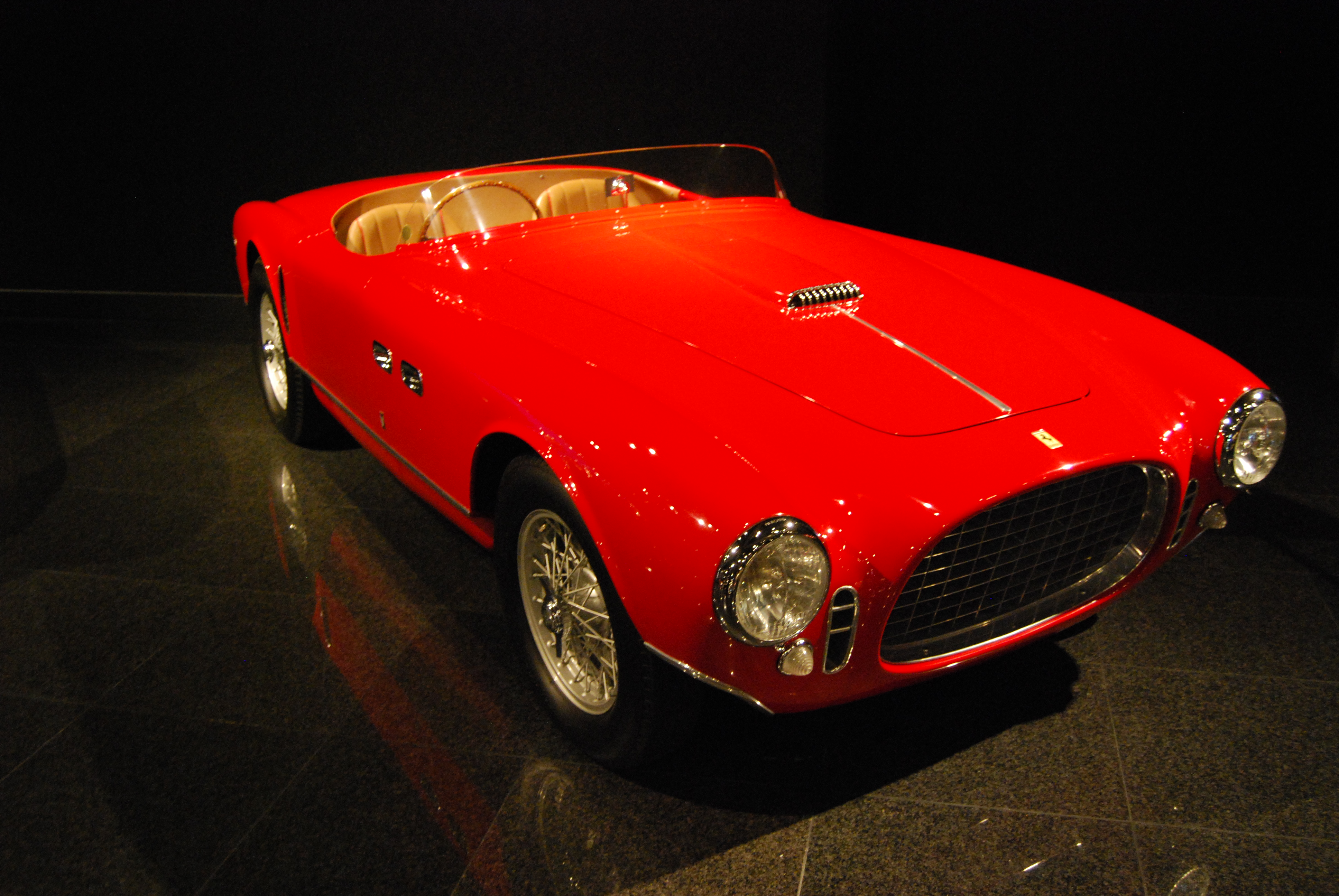 Ferrari 250 Mille Miglia del 1962 carrozzata Vignale, conservata nel Blackhawk Automotive Museum di Danville, California.